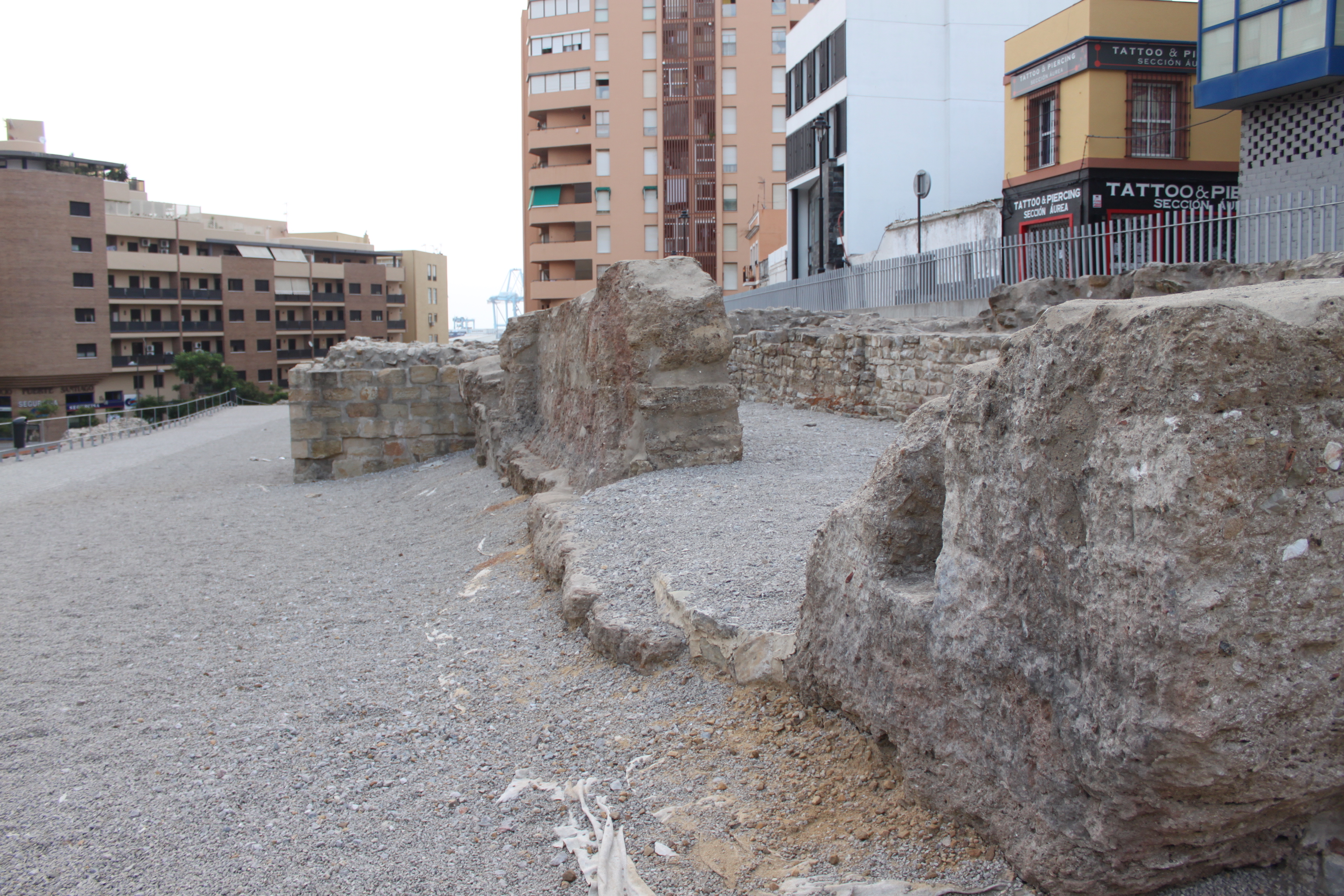 Antemuro de tapial y torre en el Parque arqueológico de las murallas meriníes. Algeciras, Andalucía, España.